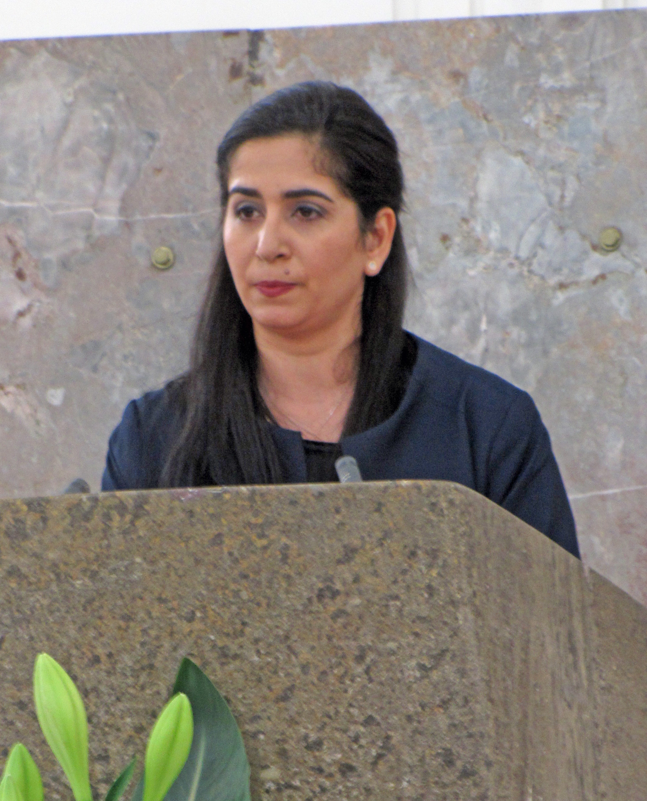 Souad Mekhennet bei ihrer Preisrede zur Verleihung des Ludwig-Börne-Preises, am 27. Mai 2018 in der Frankfurter Paulskirche.